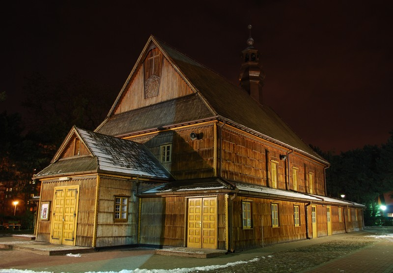 Stalowa Wola, ul. Floriańska 5 - Kościół parafialny św. Floriana (drewniana świątynia z 1802 roku, przeniesiona w 1943 roku ze wsi Stany)